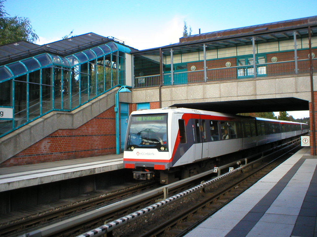 Einfahrender U-Bahnzug in die Haltestelle Richtweg (U1) in Norderstedt